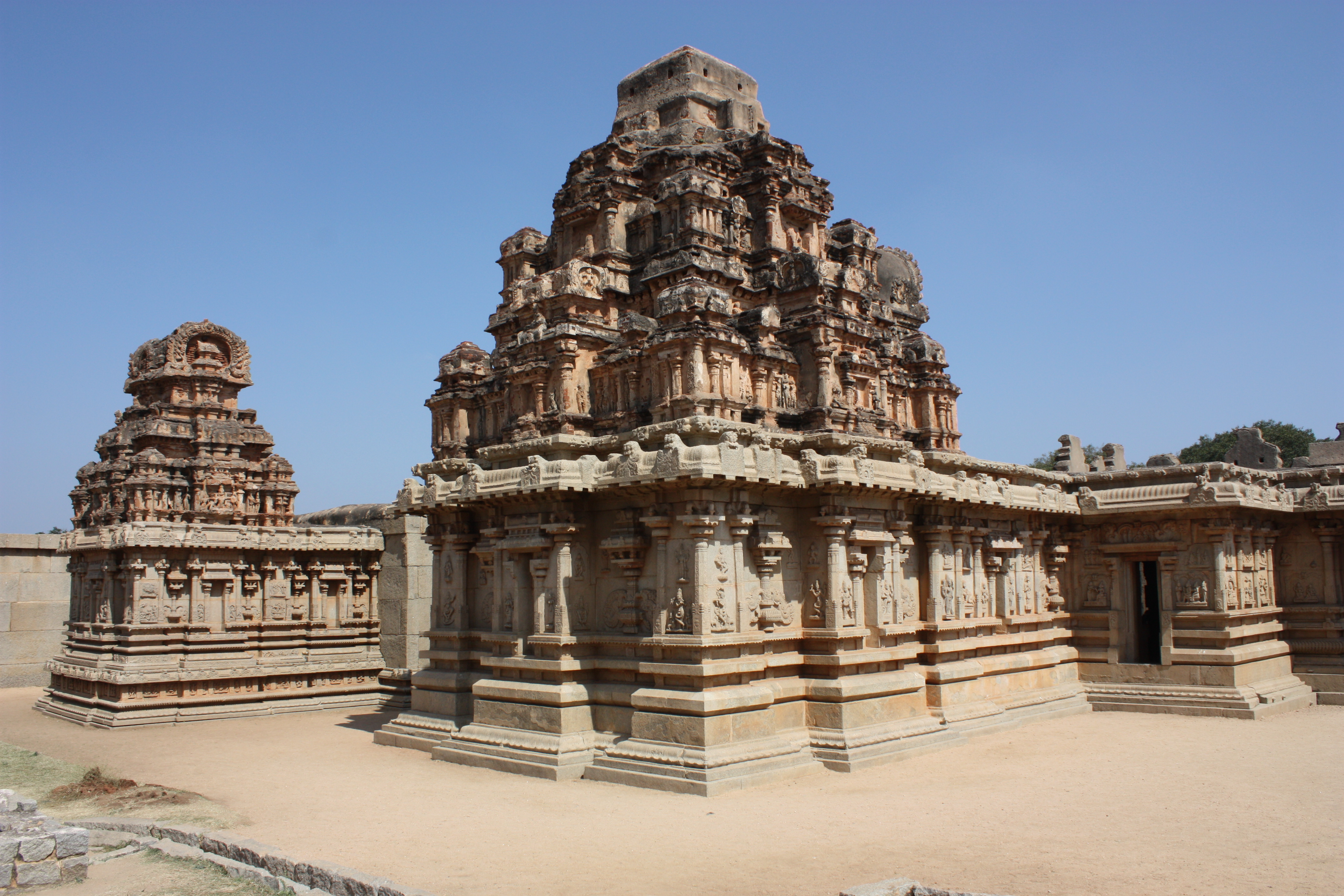 Hampi, Hazararama Temple